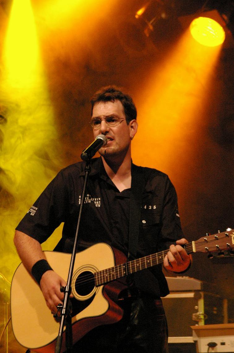 Davide Buzzi in concerto